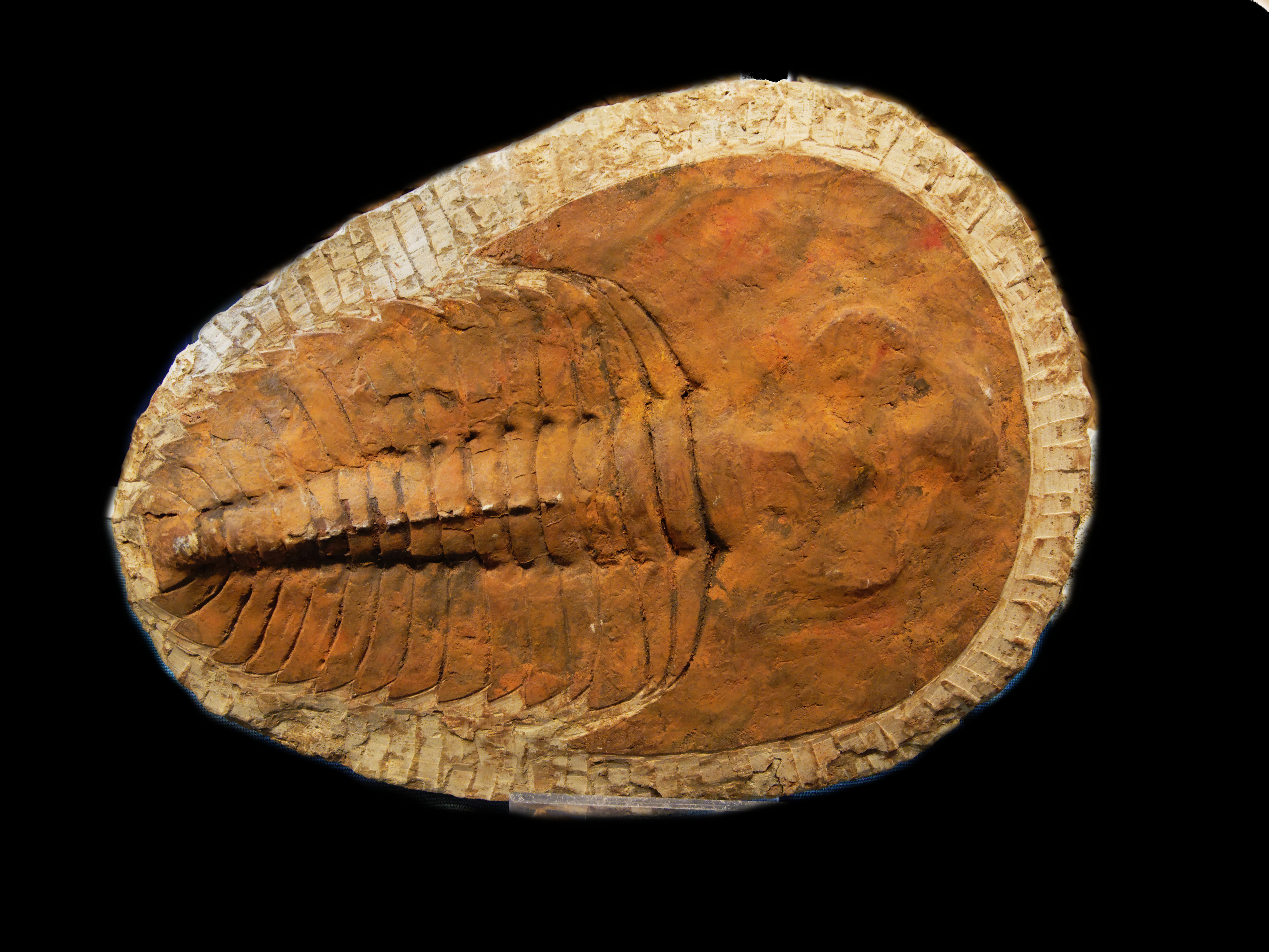 Fossile de trilobite.